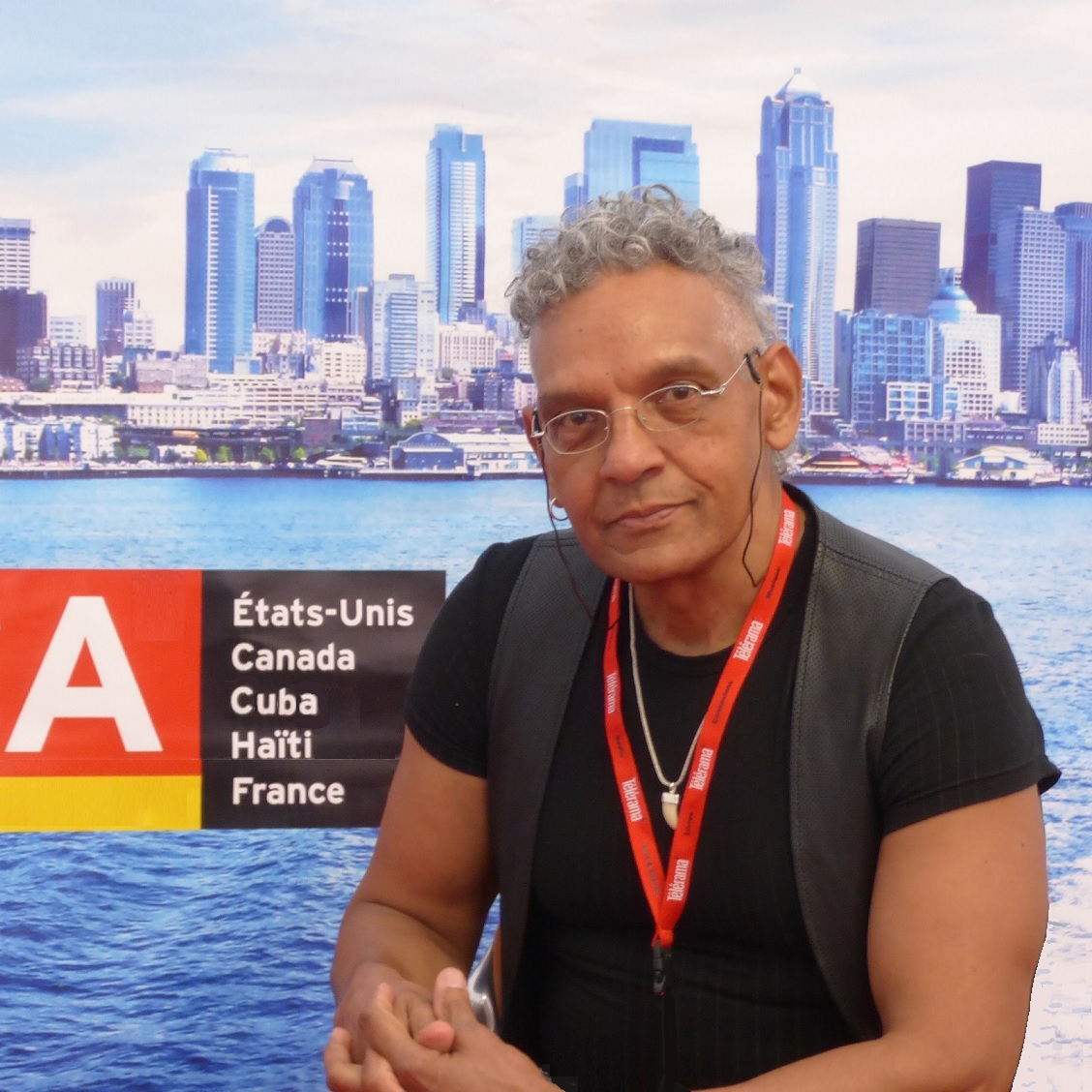 Joel Franz Rosell au Festival America du livre d'Amérique du Nord, Cuba, Haïti